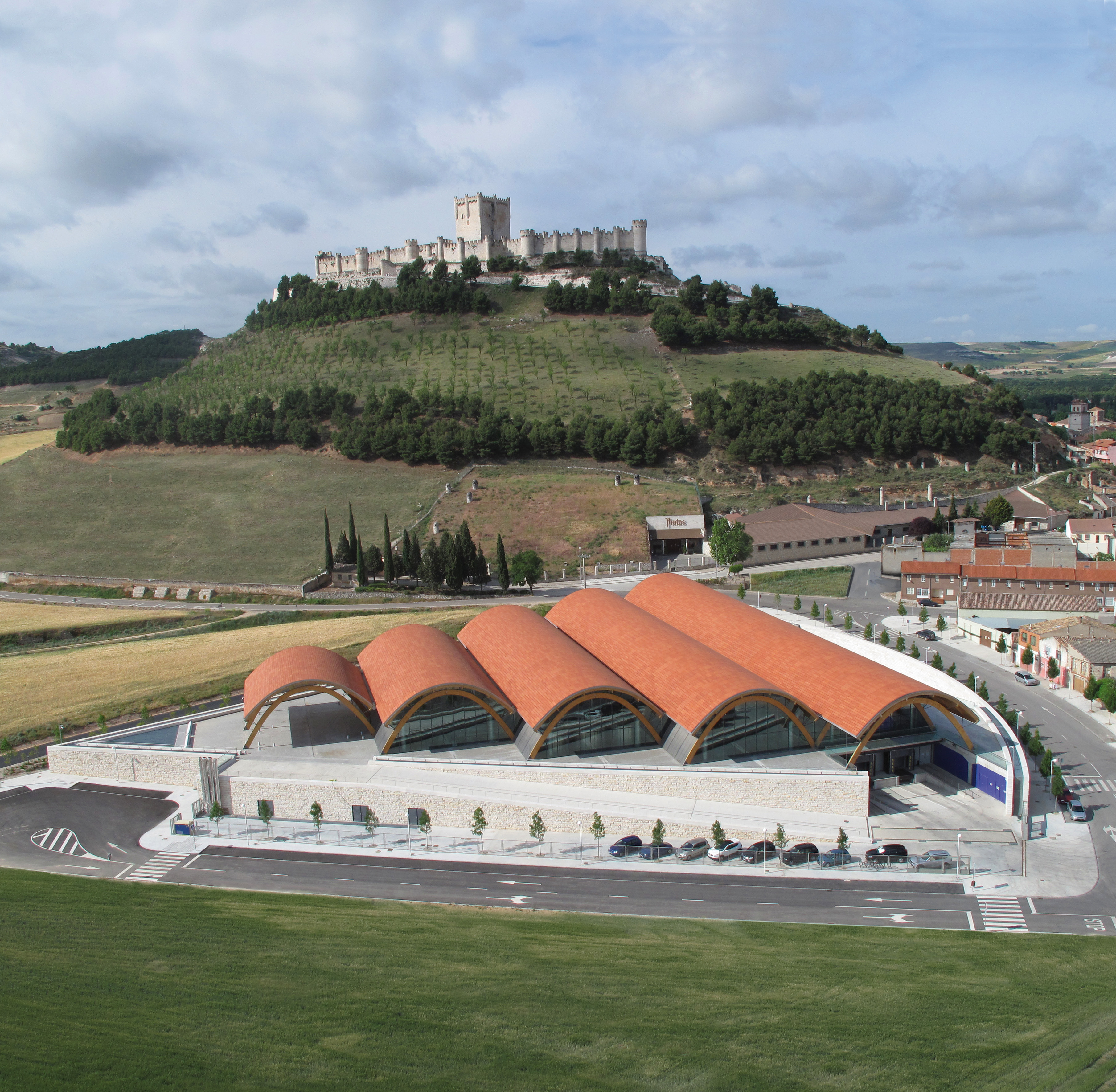 Vista Panorámica de la bodega diseñada por Richard Rogers con el Castillo de Peñafiel al fondo.